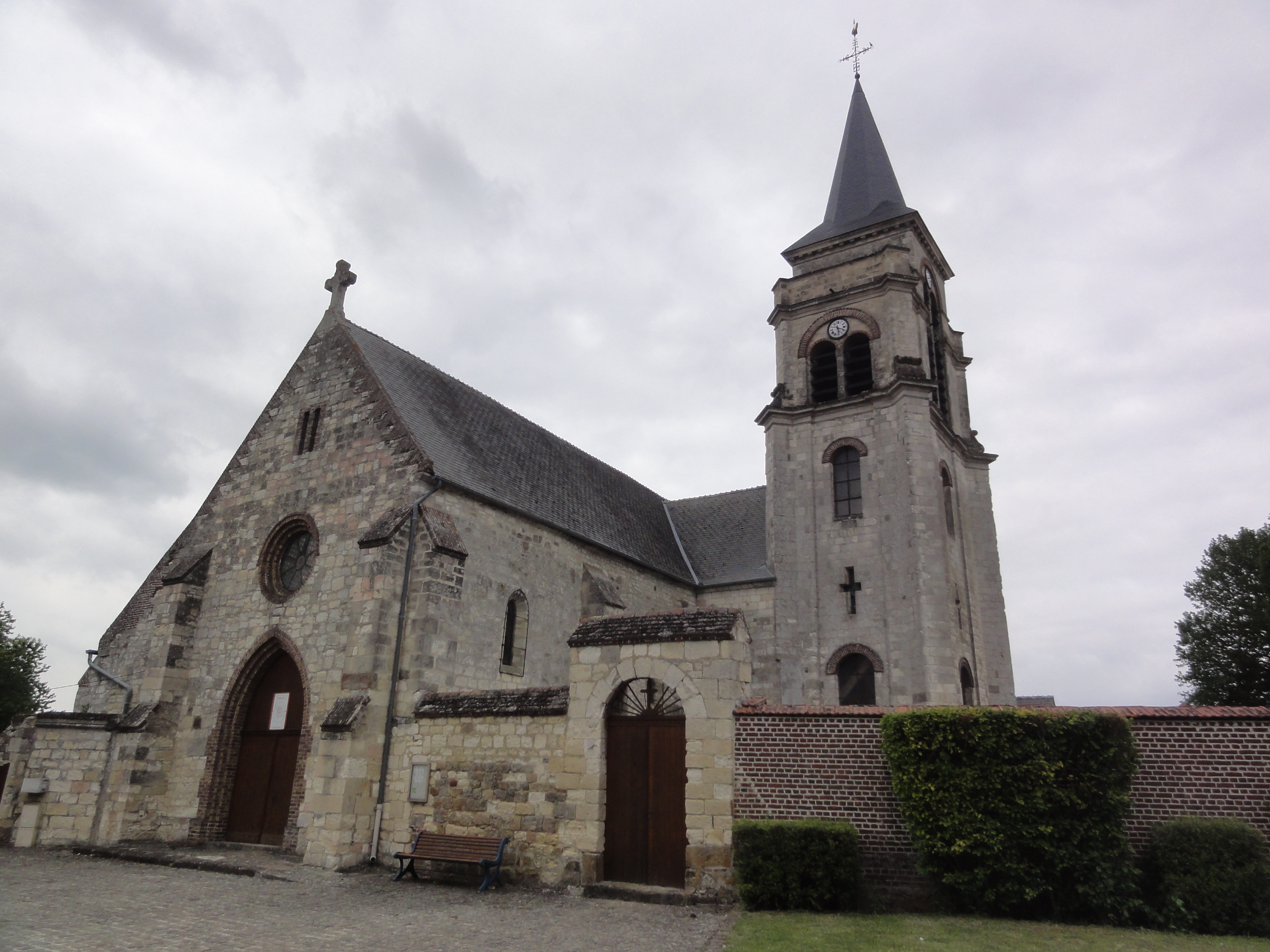 Voyenne (Aisne) Église Saint-Rémi